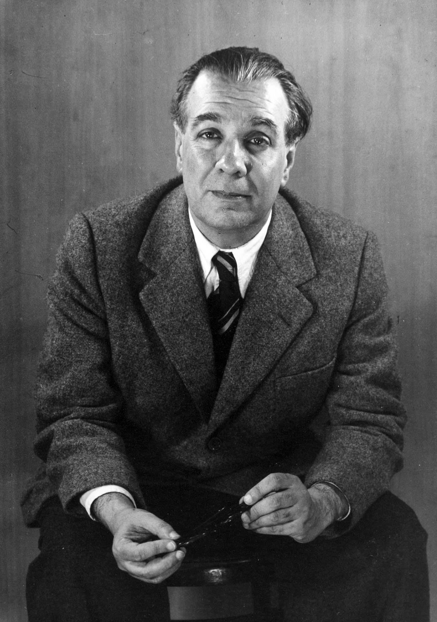 Jorge Luís Borges 1951